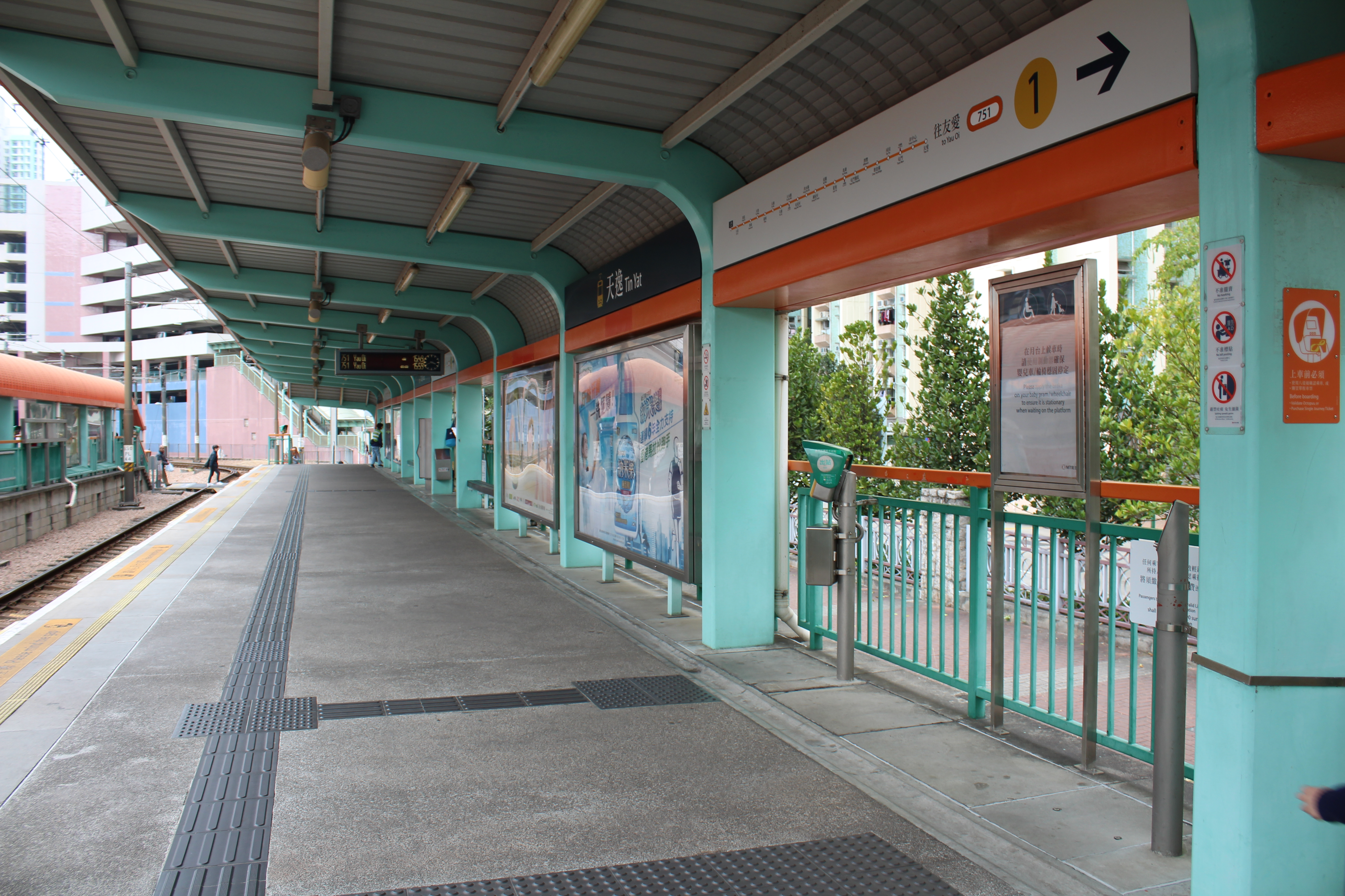 天逸站1號月台